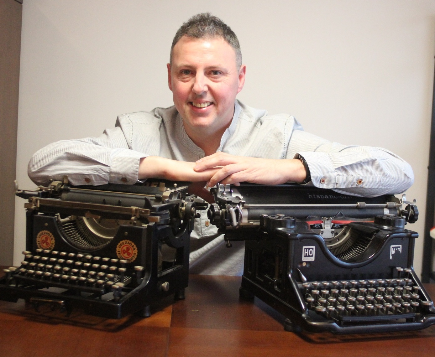 Ernesto Tubía ante dos máquinas de escribir antiguas